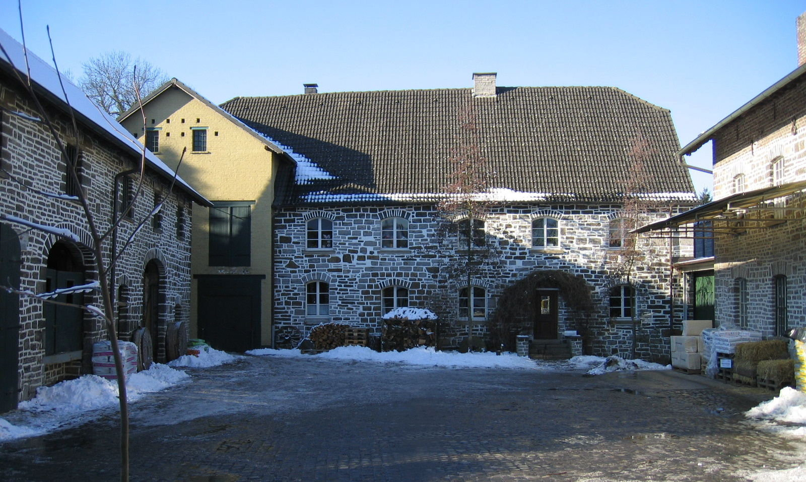 Description: "Alberts Mühle", Baudenkmal, erbaut 1865 in Hemer-Sundwig, Hönnetalstraße 39 a Source: selbst fotografiert Date: 29. Jan. 2006 Author: Asio otus